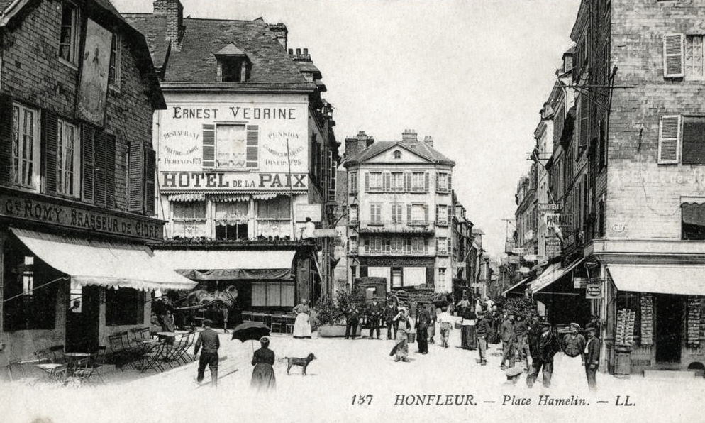 Honfleur, place Hamelin, carte postale ancienne, avant 1914